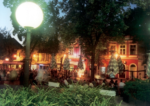 Стара чаршија у Зеници